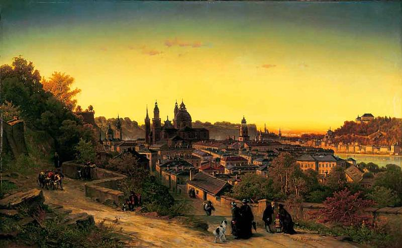 Salzburg bei Sonnenuntergang